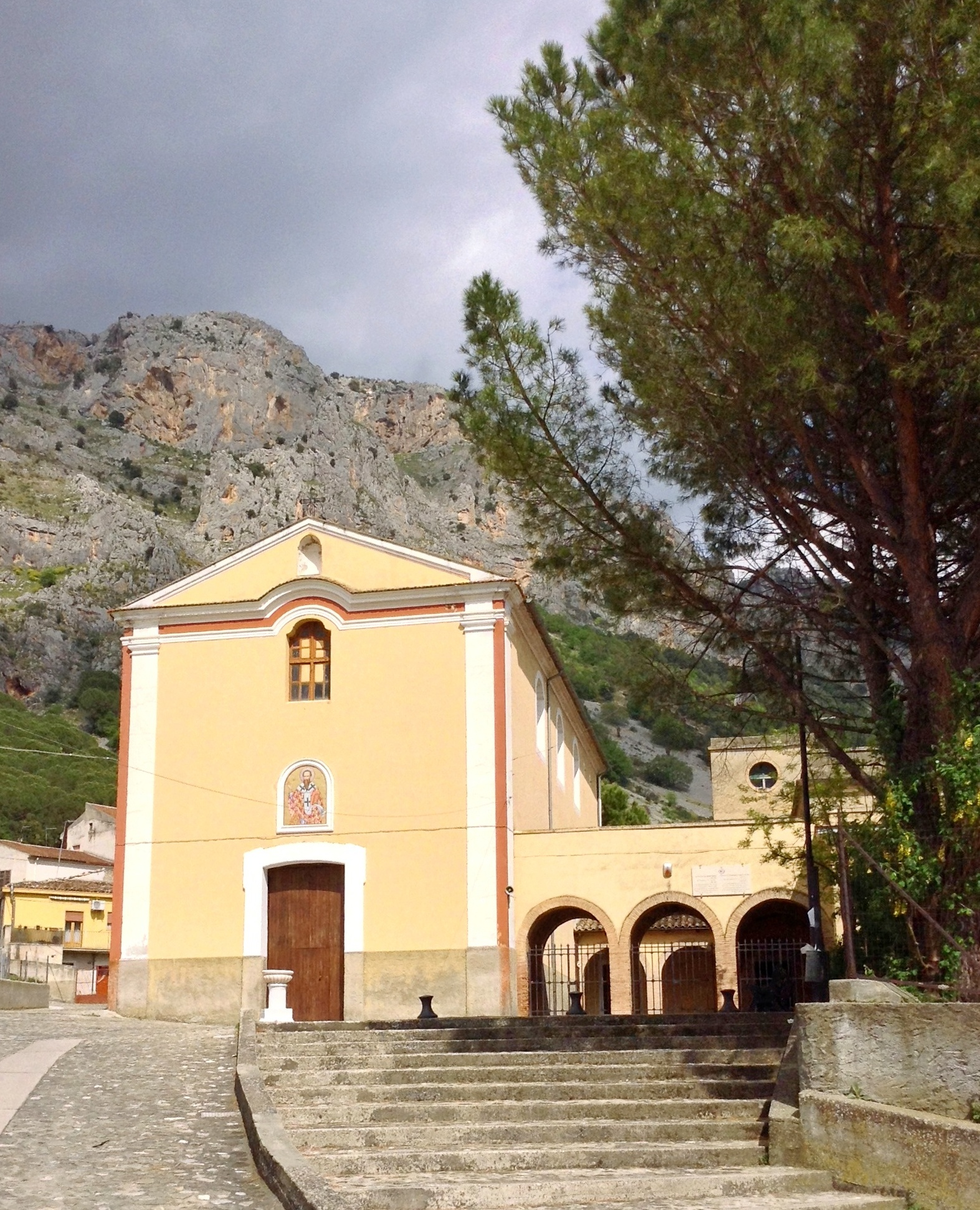 Chiesa San Basilio Magno in Ejanina, Frascineto, Kalabrien